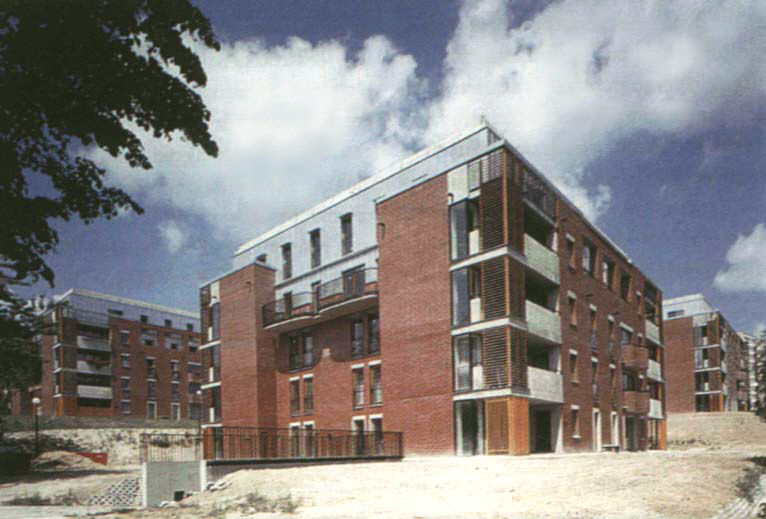 Zespół Mieszkaniowy LSM w Lublinie